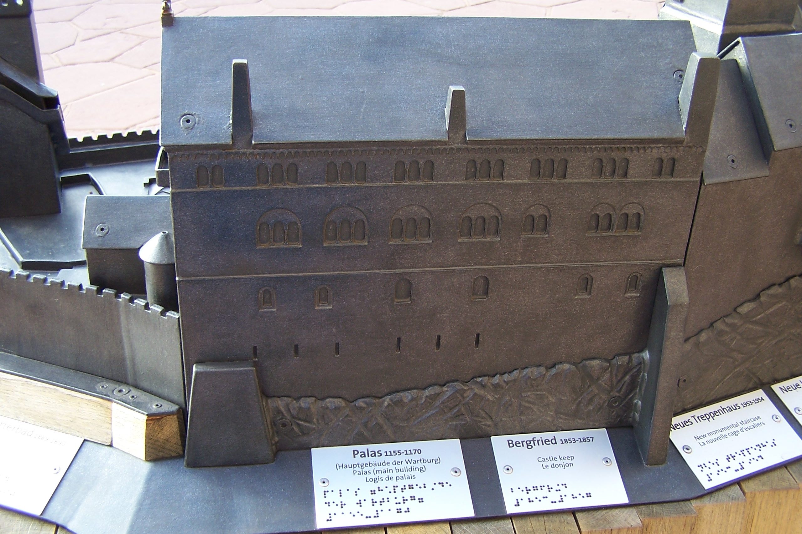 Taktiles Burgmodell auf dem zweiten Burghof, jedes Hauptgebäude ist mit einer mehrsprachigen Beschriftung in Deutsch, Englisch, Französisch und in Brailleschrift markiert.